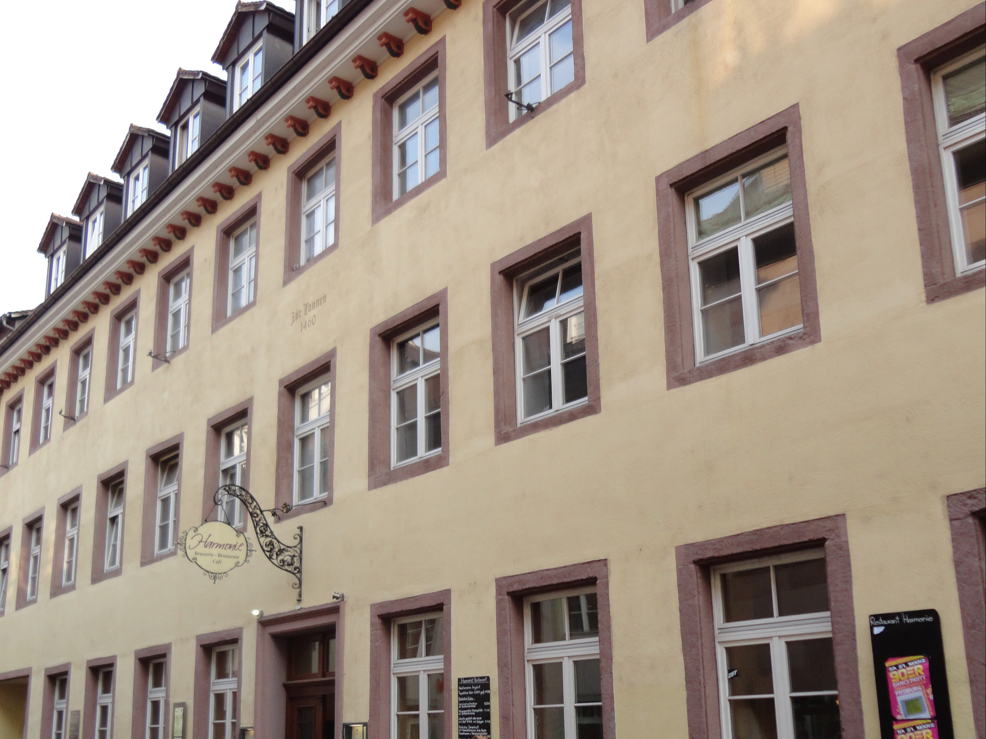 Nach dem zweiten Weltkrieg fand am 25. August 1946 in der Gaststätte Harmonie an der Grünwälderstraße (Freiburg im Breisgau) die Gründungsversammlung des Freiburger Schachvereins statt. Mitglieder kamen aus den ehemaligen Vereinen Freiburger Schachklub, Schachverein Zähringen, Schachklub Alia und Arbeiter-Schachklub.